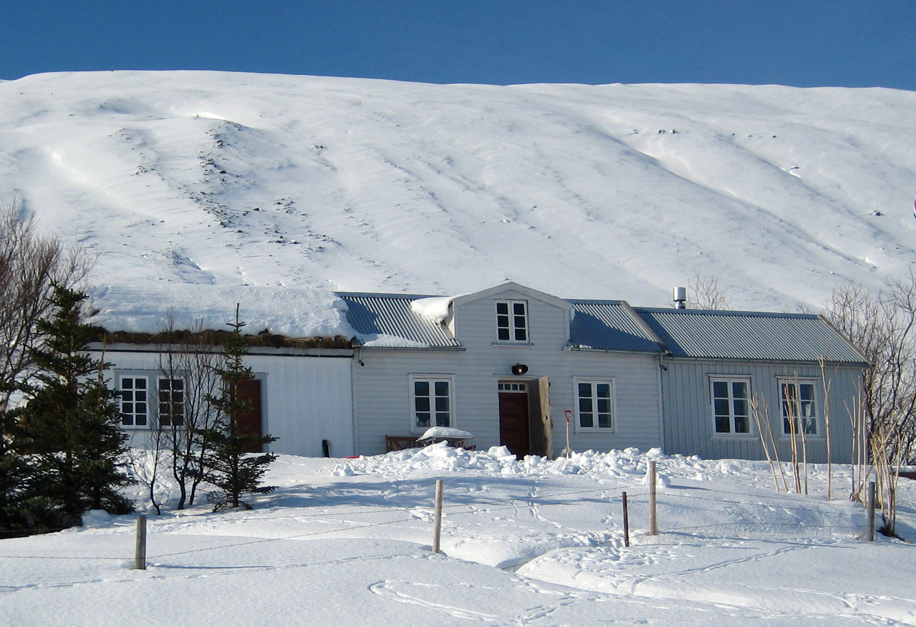 Gullbringa í Svarfaðardal (N-Iceland)